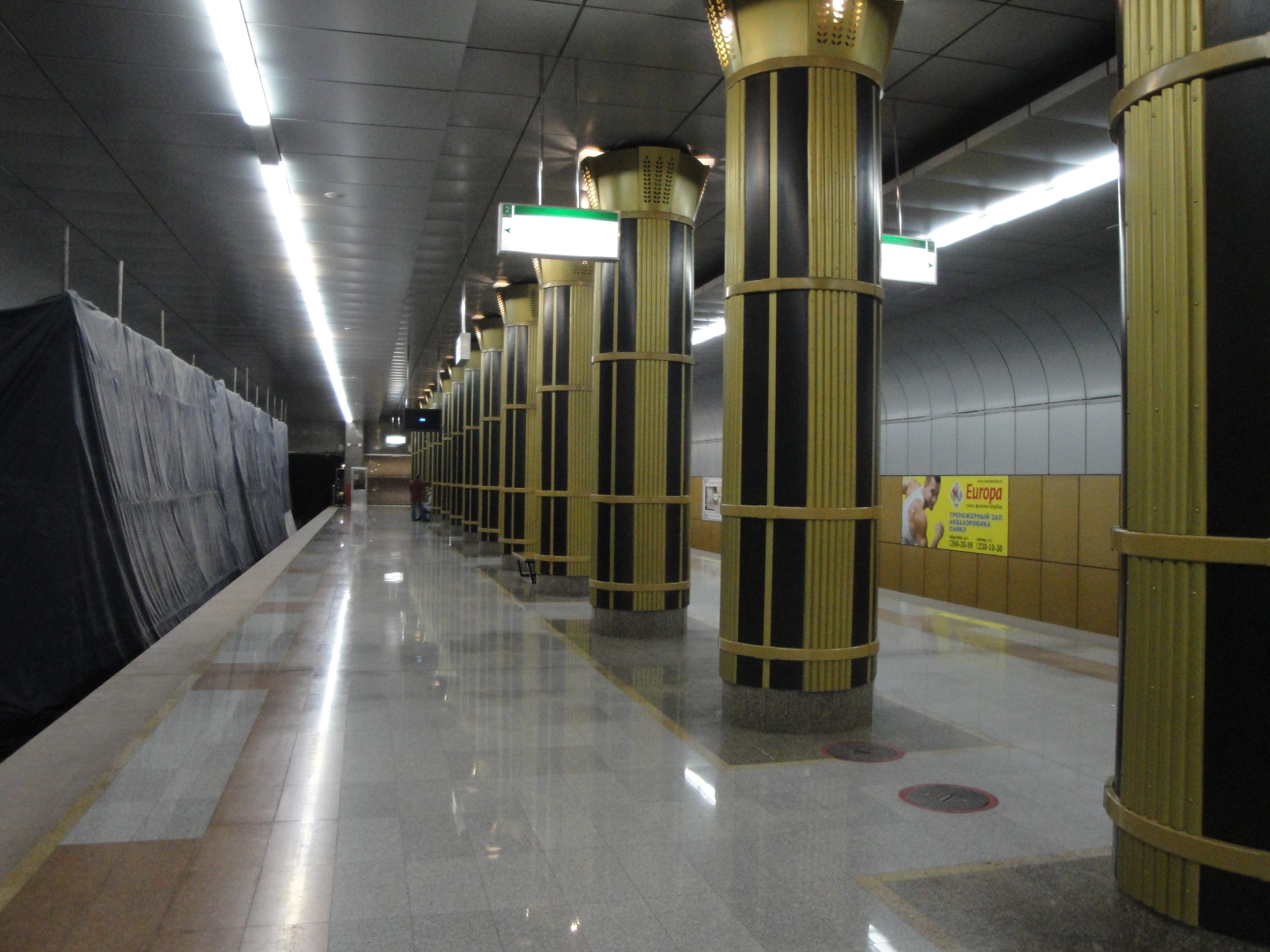 Станция "Золотая Нива". Общий вид. Конструкции на недостроенном пути